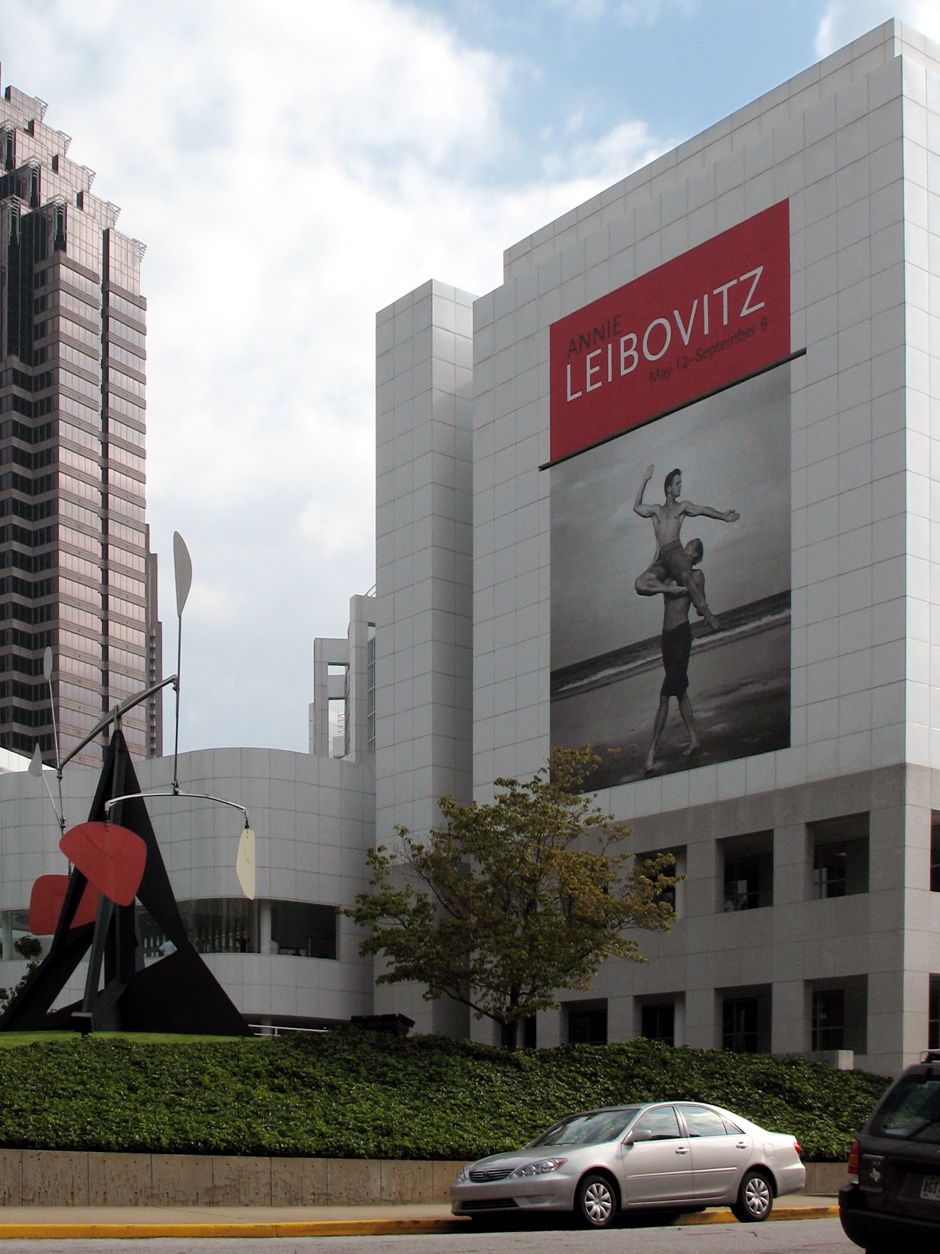 El High Museum of Art —Atlanta, Georgia— durante la exhibición de la fotógrafa Annie Leibovitz en septiembre de 2007. En el afiche se aprecia el retrato en blanco y negro que Leibovitz realizó a los bailarines Mikhail Baryshnikov y Rob Besserer cuando ensayaban en la costa de Cumberland Island, Georgia, en 1990.